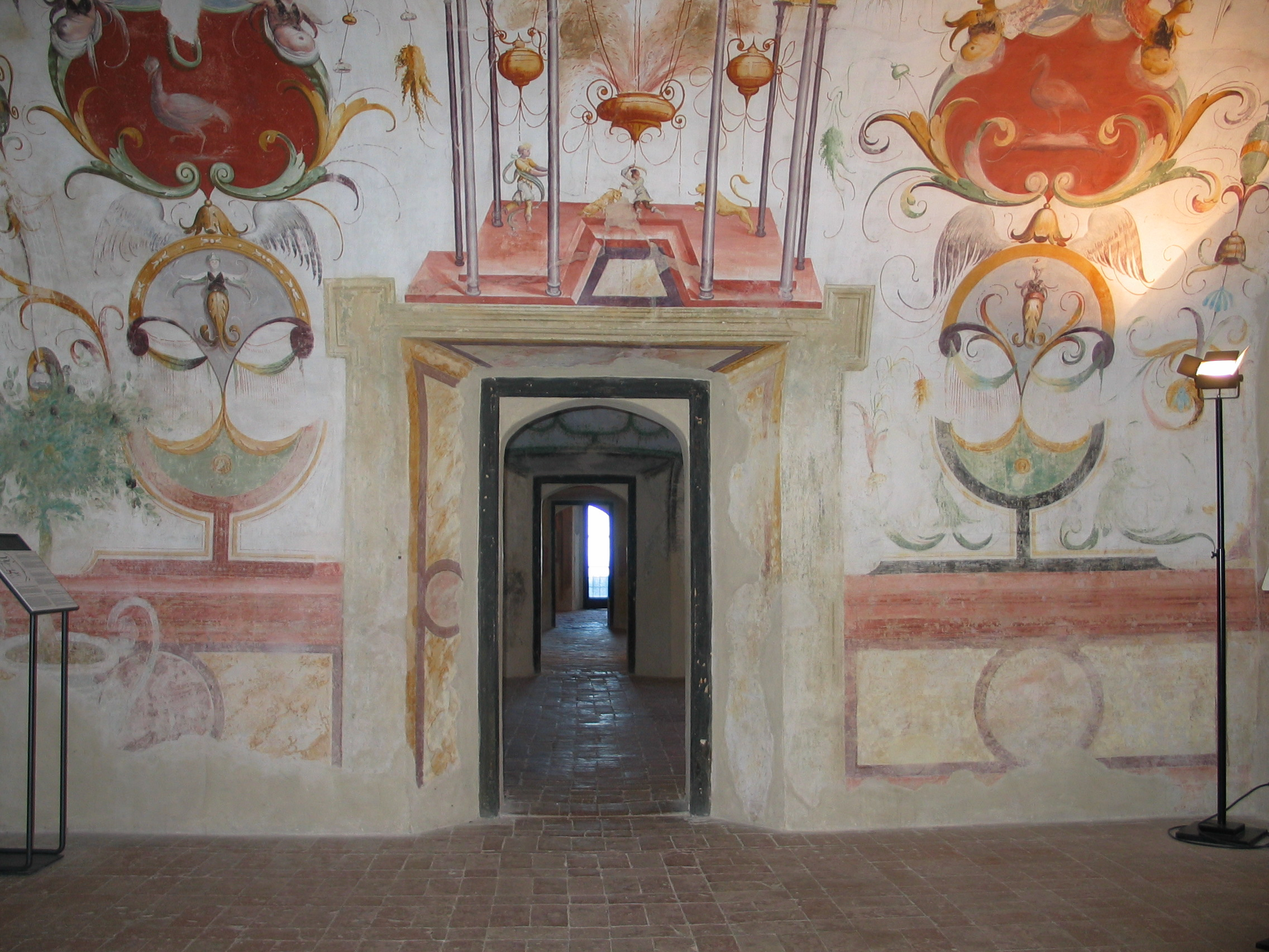 Castello di Torrechiara - MIBAC This is a photo of a monument which is part of cultural heritage of Italy.